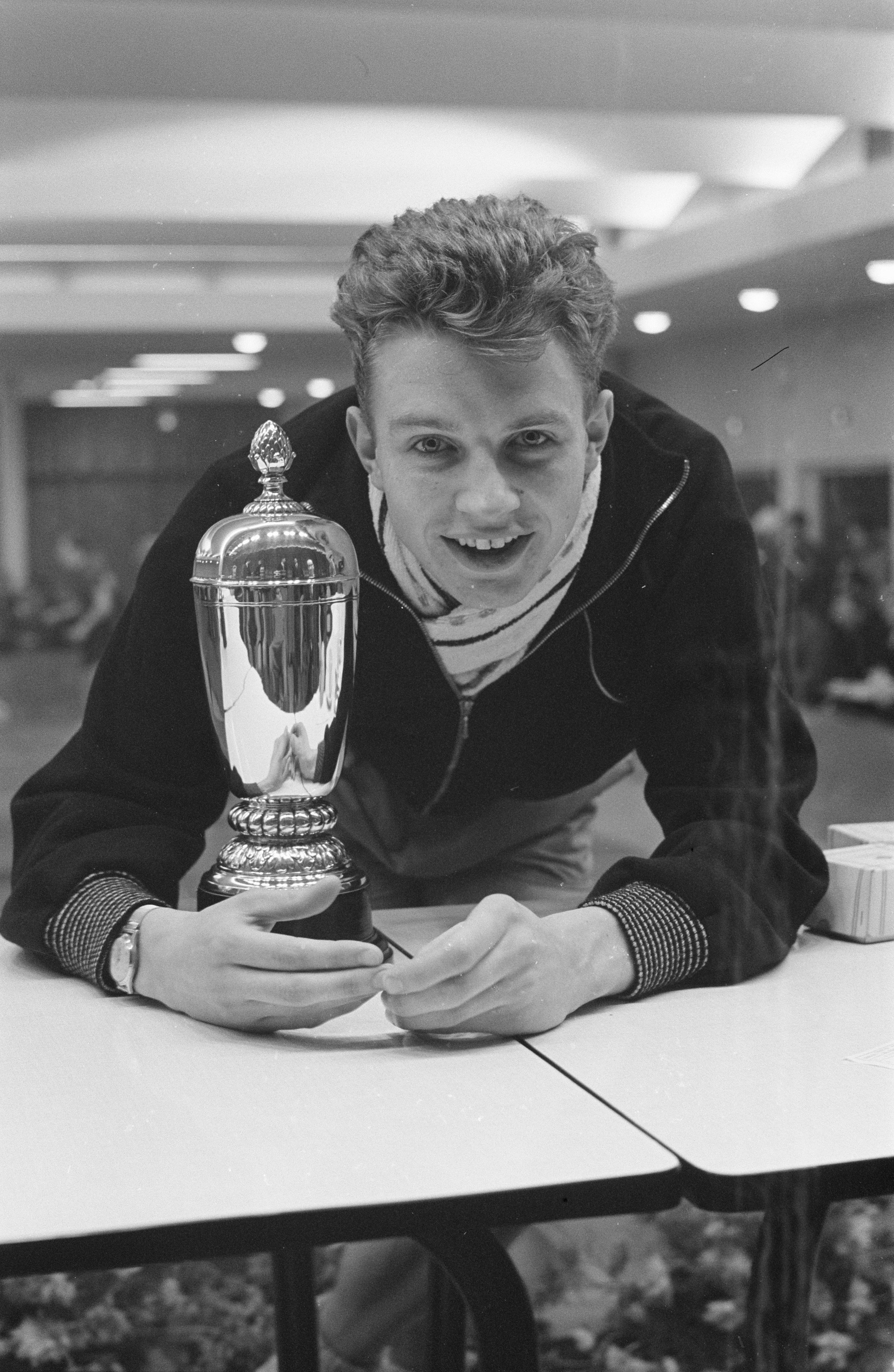 Achtkamp tafeltennis te Haarlem. Bert Onnes met beker.